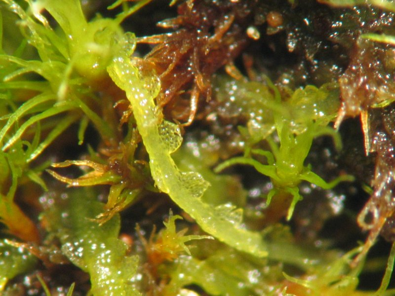 Moor-Kopfsprossmoos (Cephalozia connivens), etwa 30x vergrößert